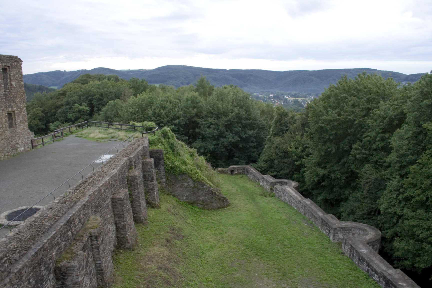 Blick auf den Hof der Burg Windeck